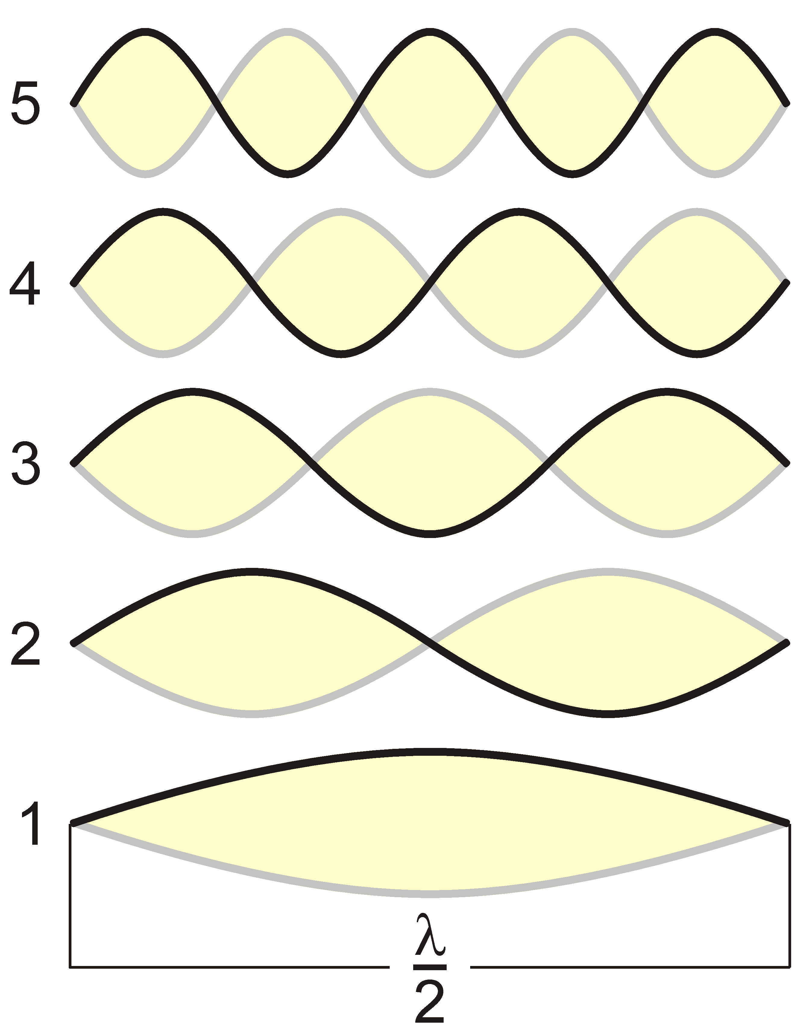 Schwingende Saiten Wer klickt, kommt zum Bild! diese Kompression wird leider in bestimmten Skalierungen nicht am Bildschirm angezeigt; Thumbnails in Größe 120px funktionieren, beispielsweise, viele andere auch, nicht aber etliche Standards.